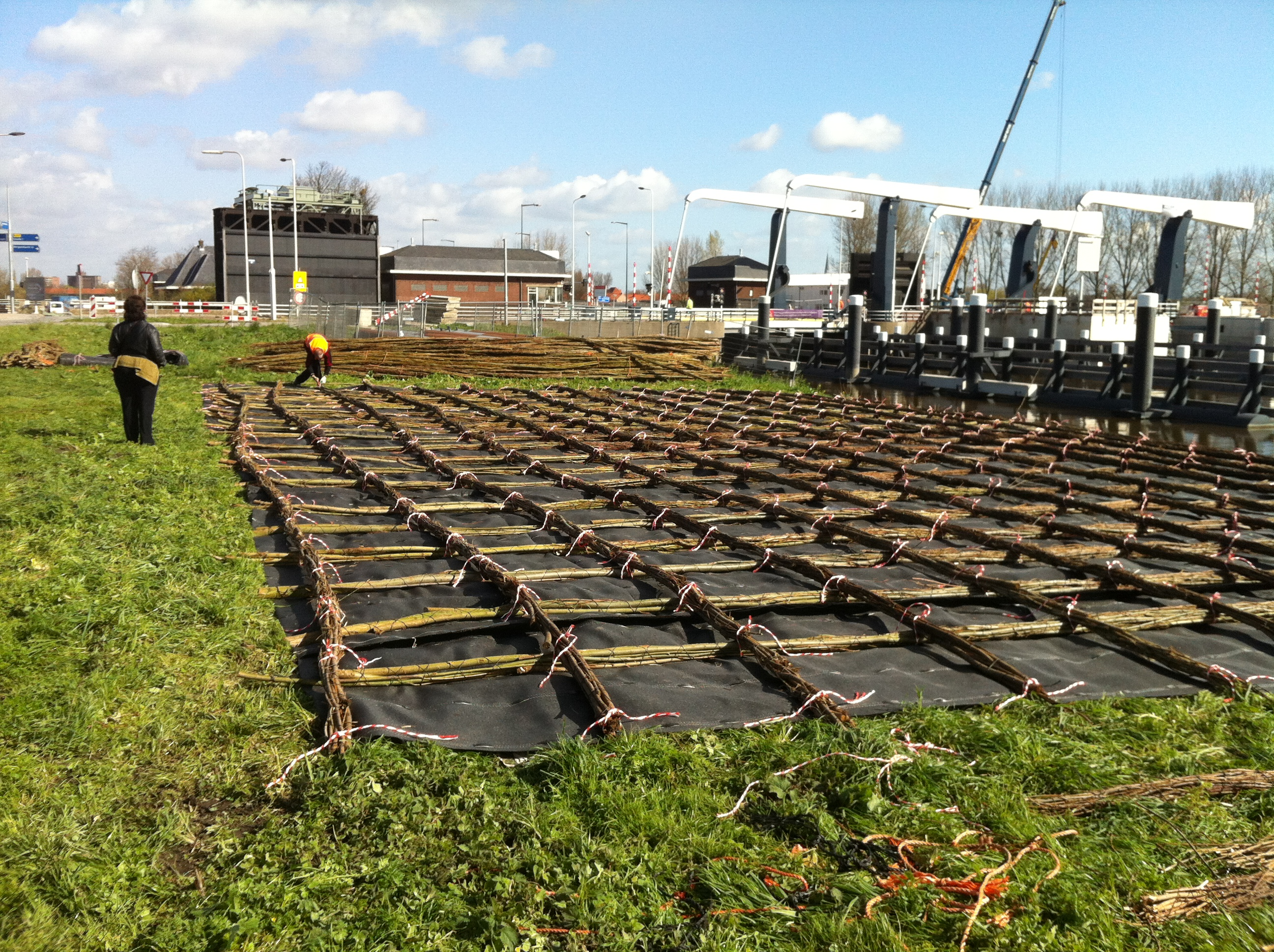 Zinkstuk voor de Hollandse IJssel bij de nieuwe Julianasluis in Gouda.